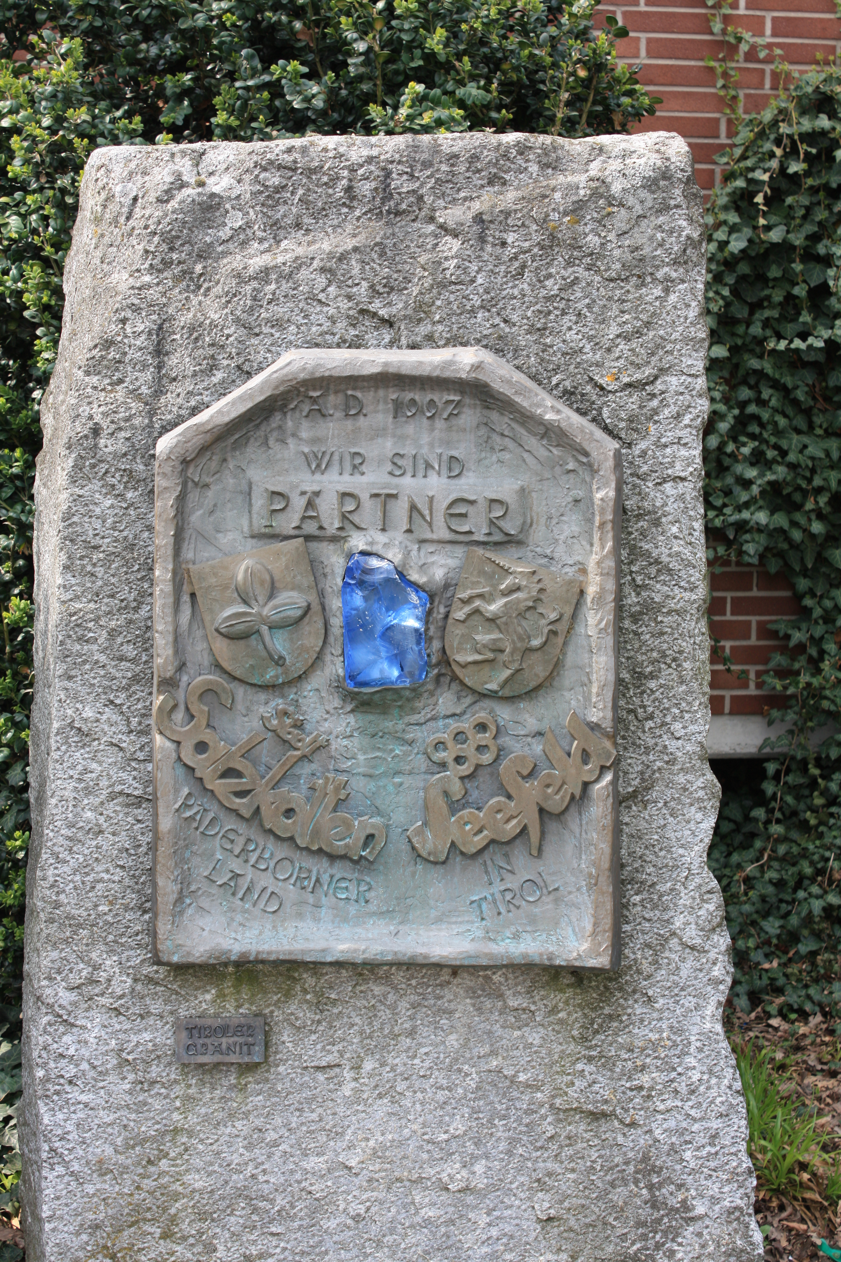 Gedenkstein der Städtepartnerschaften von Salzkotten